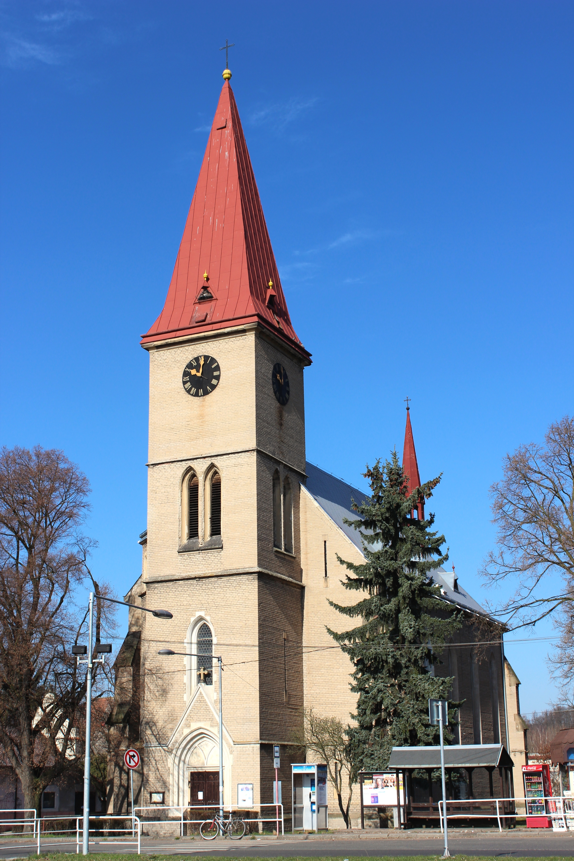 Kostel sv. Kateřiny, Milovice